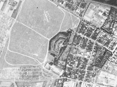 Fort VII Twierdzy Poznań sfotografowany przez satelitę KH-4A 1023, 23 sierpnia 1965 r.